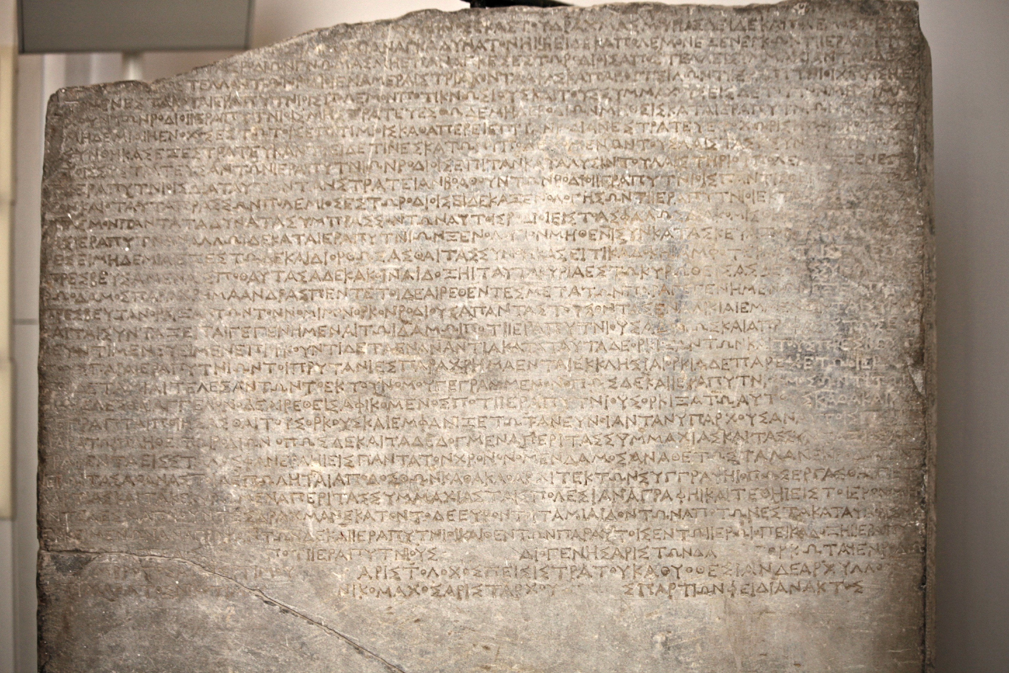 Museo Archeologico Nazionale - MIBAC This is a photo of a monument which is part of cultural heritage of Italy.